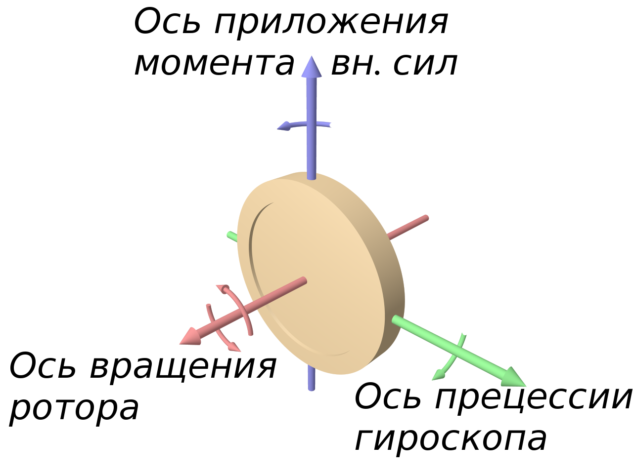 Гироскоп с осями